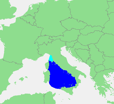 In dutch: Locatie Tyrreense Zee.PNG